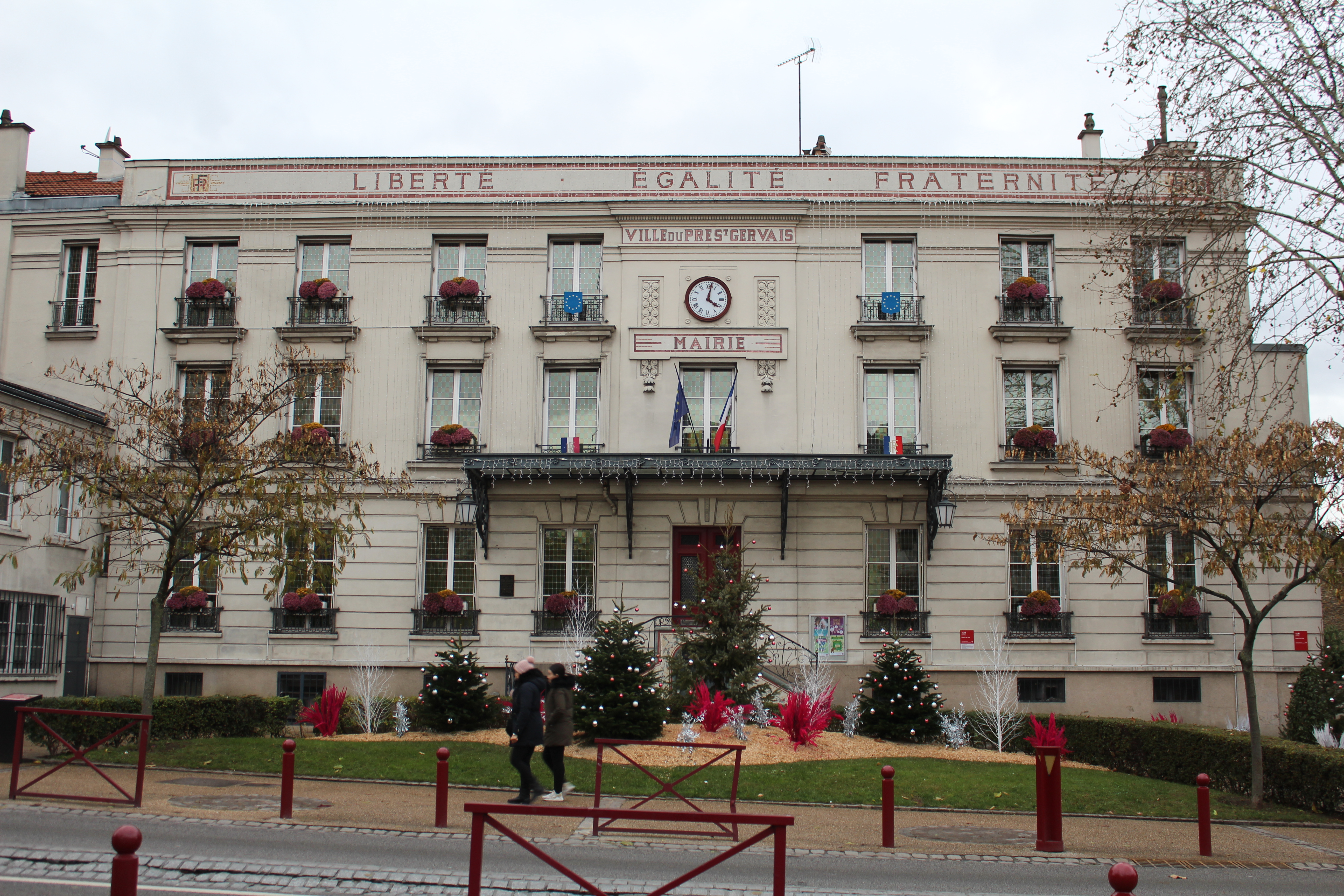 Mairie du Pré-Saint-Gervais.